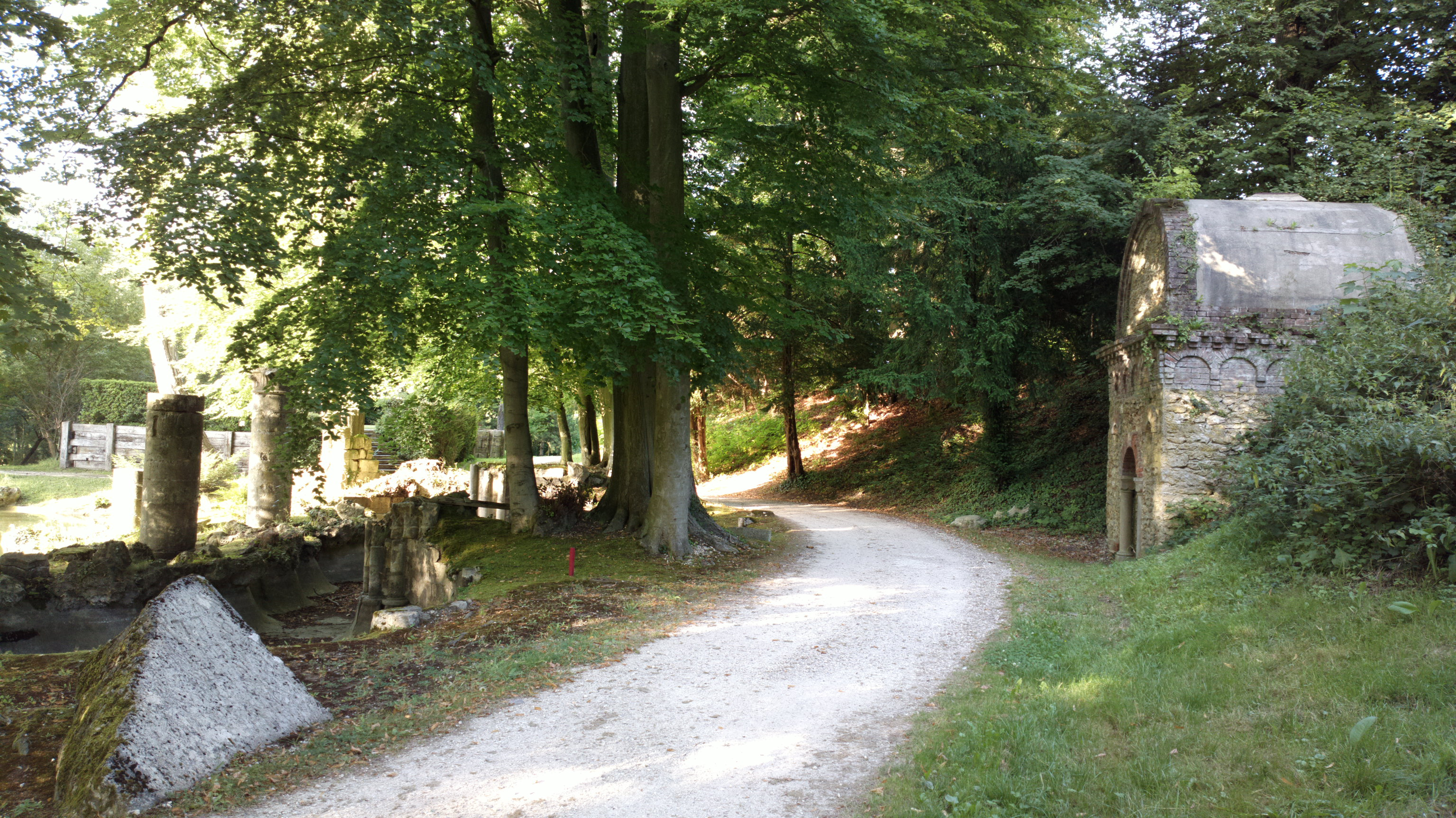 L'abbaye de Joyenval est une ancienne abbaye desservie par les Prémontrés, qui se trouvait dans la forêt de Marly, dans le territoire de la commune actuelle de Chambourcy (département des Yvelines).